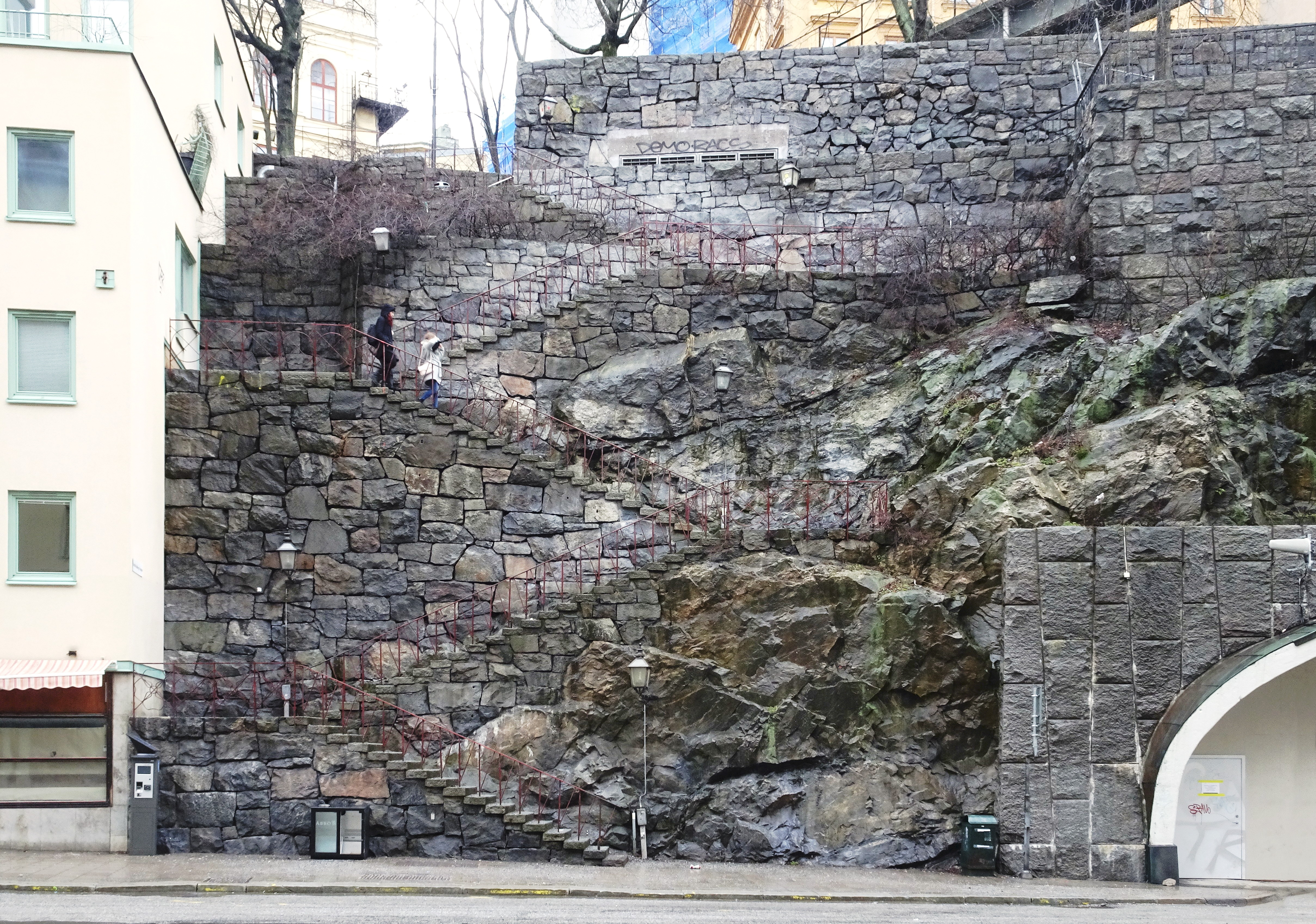 Harald Lindbergs trappor på Södermalm, Stockholm